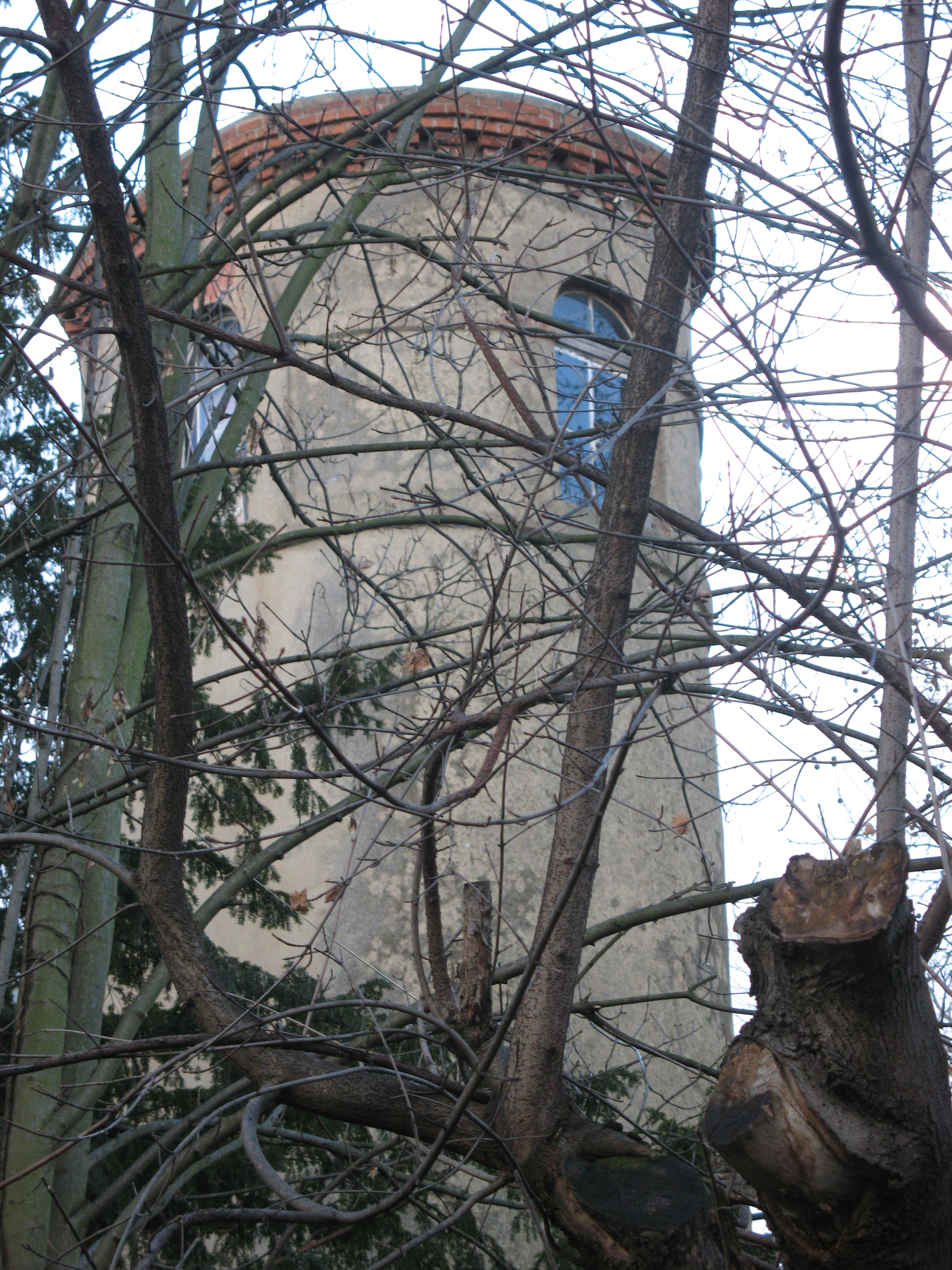 Château de La Tour à Saint-Genis-Laval dans le Rhône.